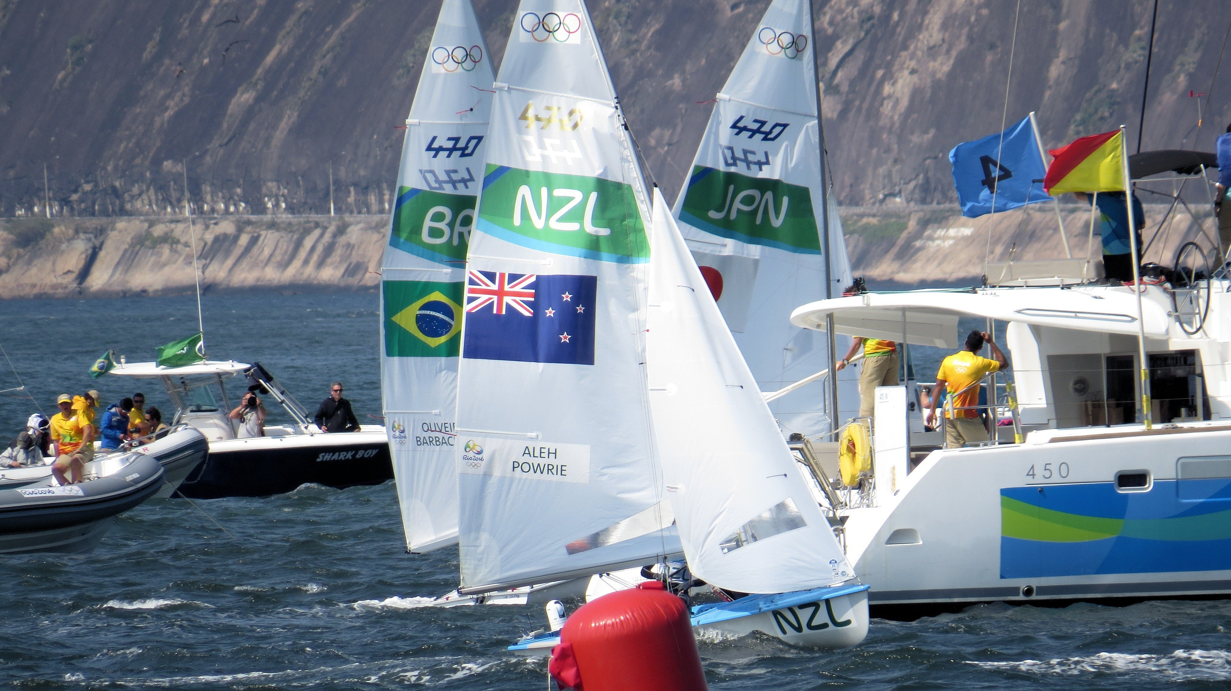 sx50